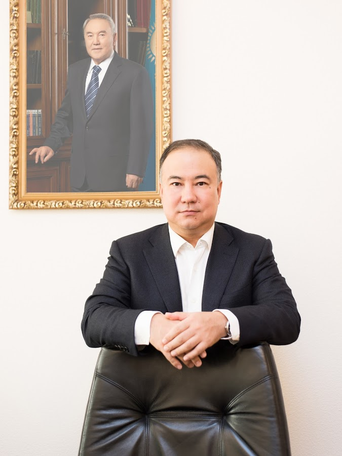 Фотография М. Мурзалина, Астана